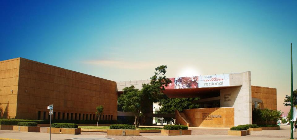 Fachada frontal del Museo de Arte e Historia de Guanajuato